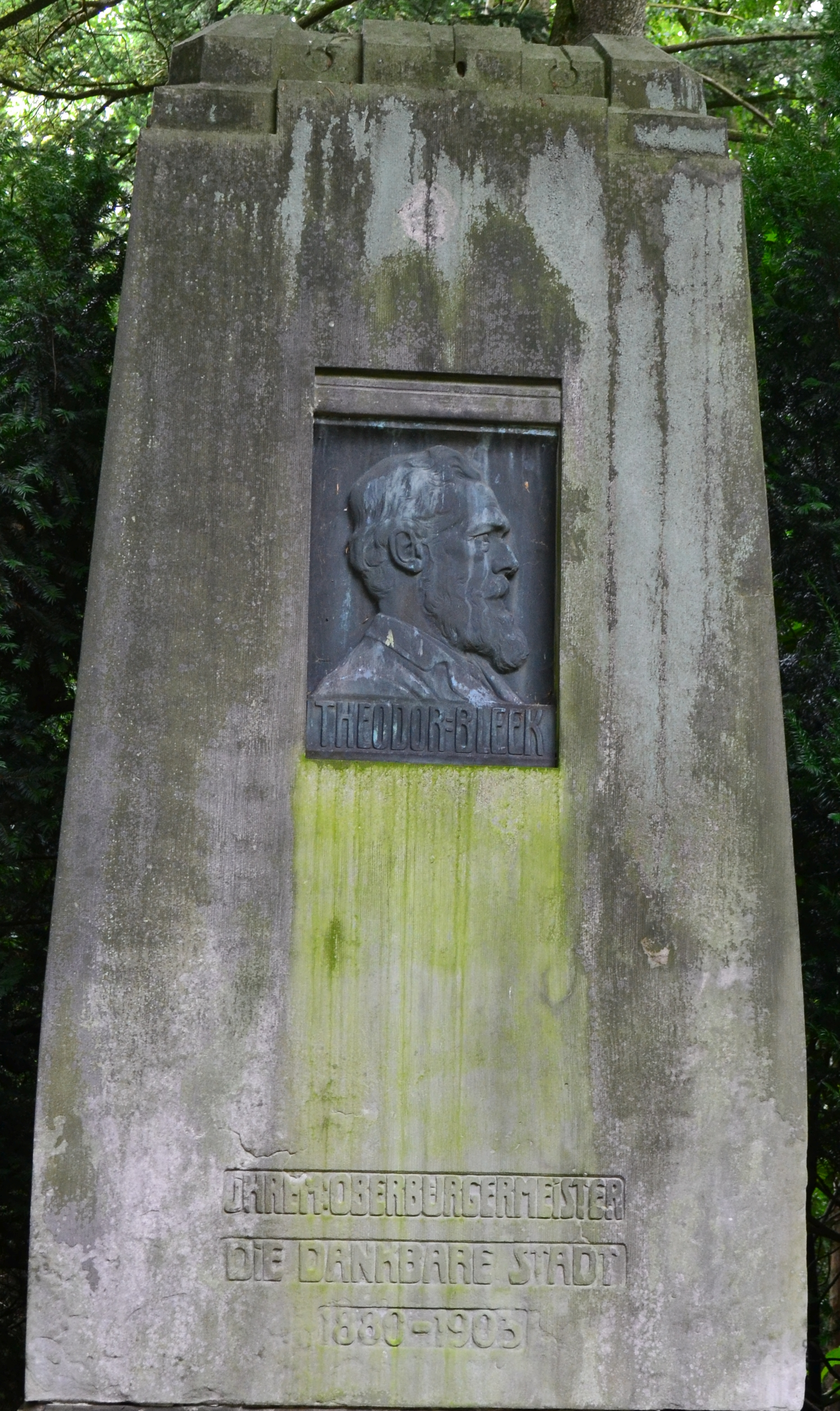 Gedenkstein für den ehemaligen Oberbürgermeister der Stadt Minden Theodor Bleek auf dem Nordfriedhof